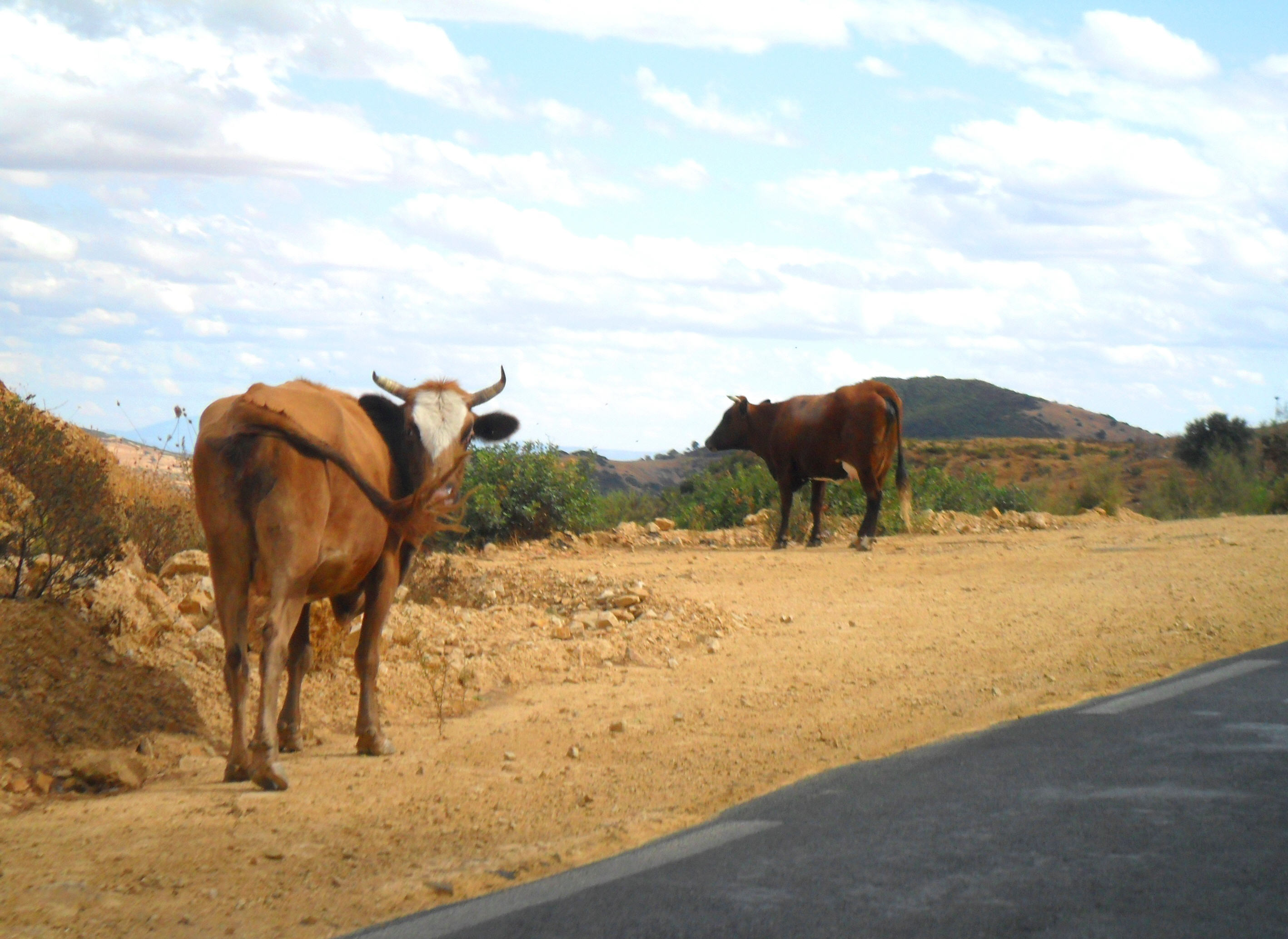 Bovins de Tacheta ابقار